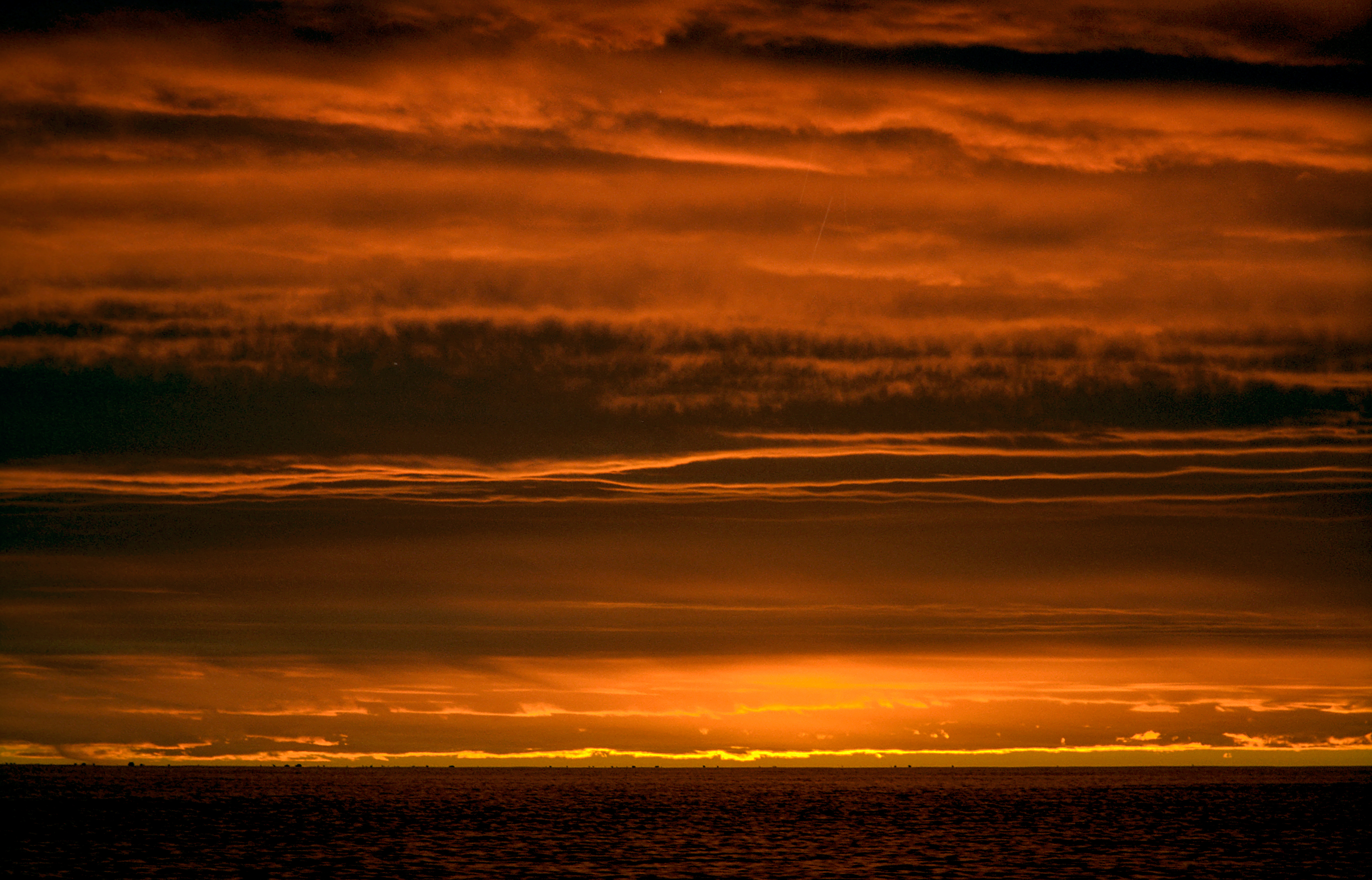 Greenland Sea at night